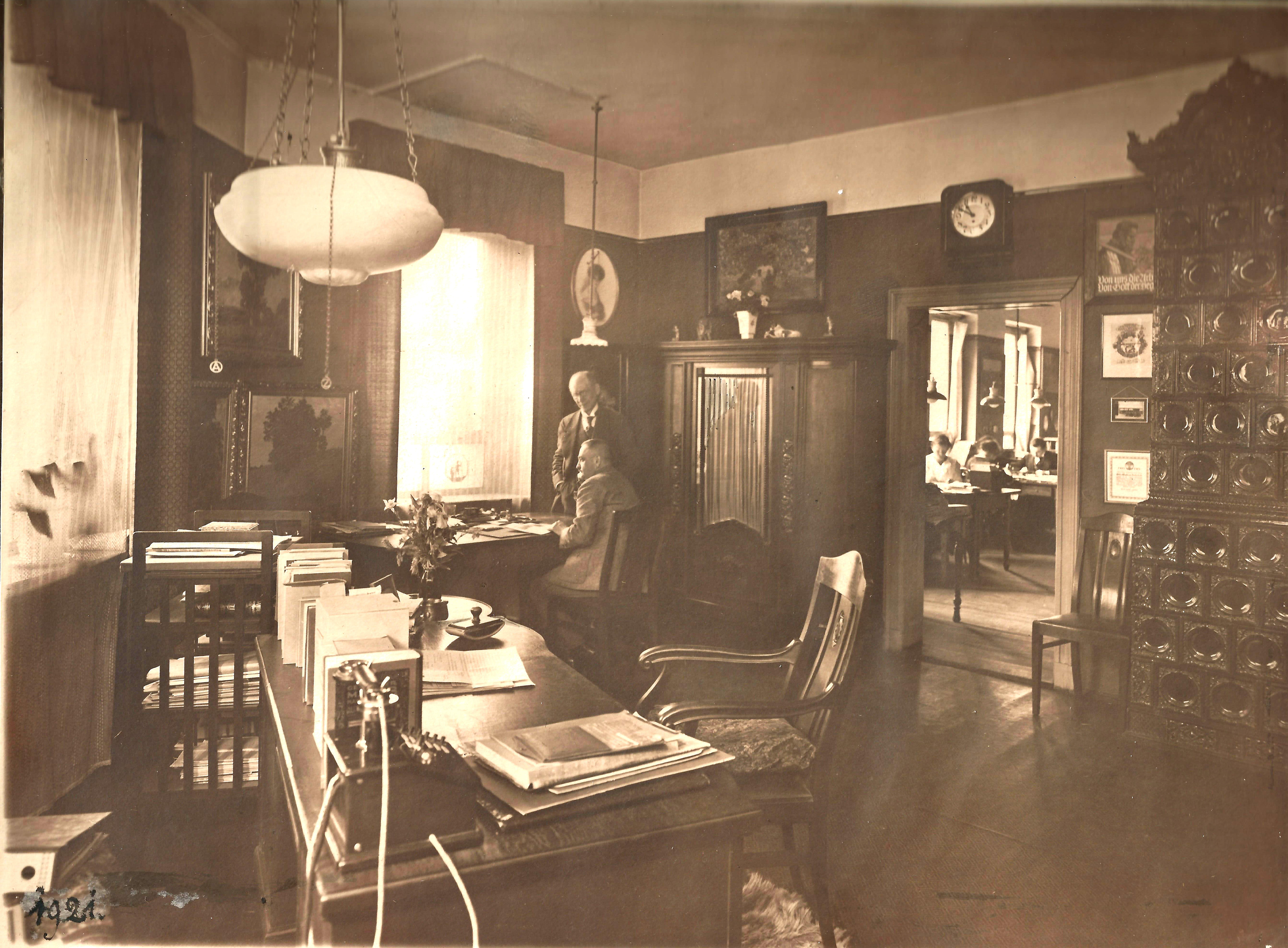 Verlag Walther Fiedler Leipzig, ca. 1901